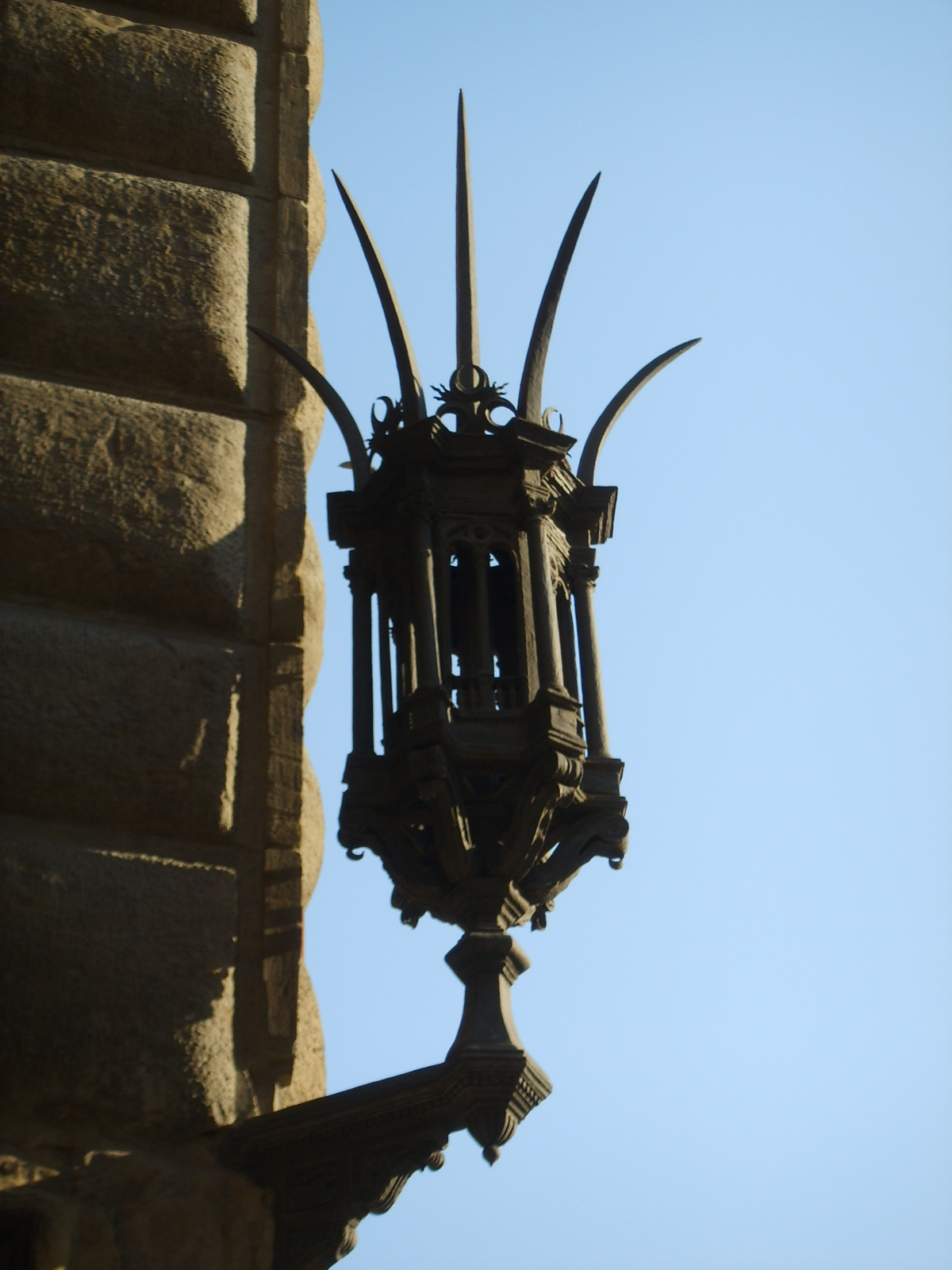 Palazzo Strozzi a Firenze, lanterna in ferro battuto del Caparra.